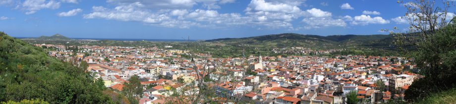 Panorama di Siniscola (Nuoro)